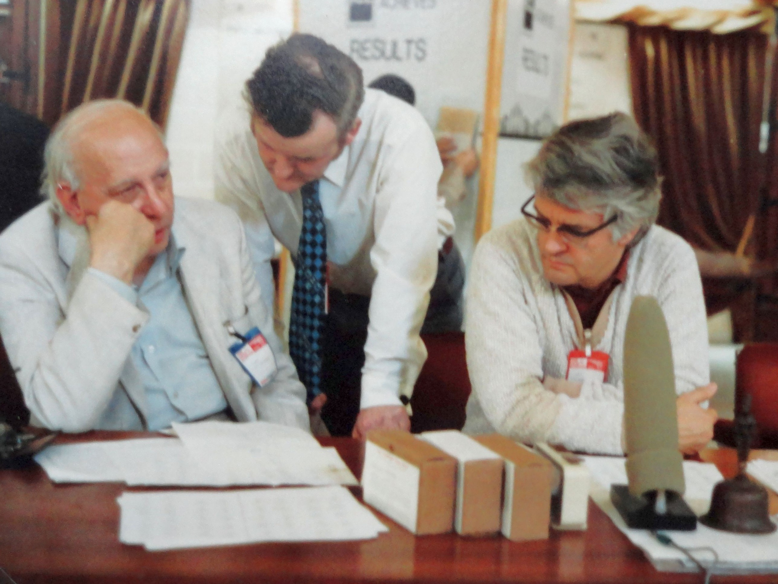 Hauptschiedsrichter Lothar Schmid (rechts) mit seinem Team, Schacholympiade 1980 in Valletta auf Malta.